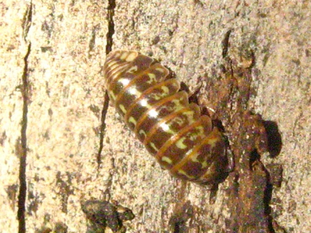 Die Rollassel Armadillidium pictum, gefunden am 07.08.2007 im Nauener Stadtwald am Stamm einer Gemeinen Kiefer in ca. 1,7 m Höhe. (Landkreis Havelland, Brandenburg) Danke an User:Pudding4brains für die Bestimmung der Assel.Object location52° 37′ 31″ N, 12° 57′ 34″ E